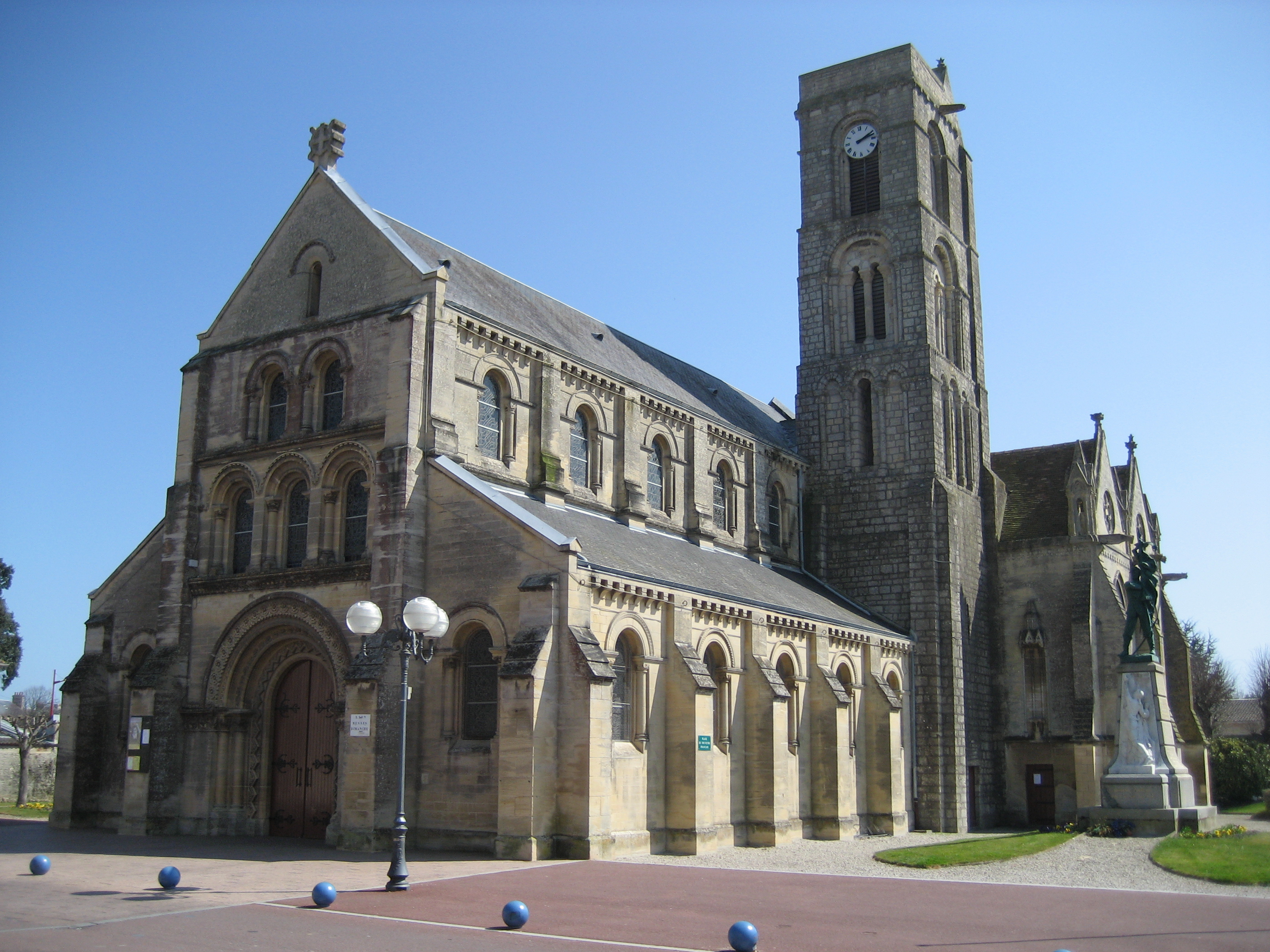 Église Saint-Pierre de Lion-sur-Mer dont le clocher est classé monument historique depuis 1913.